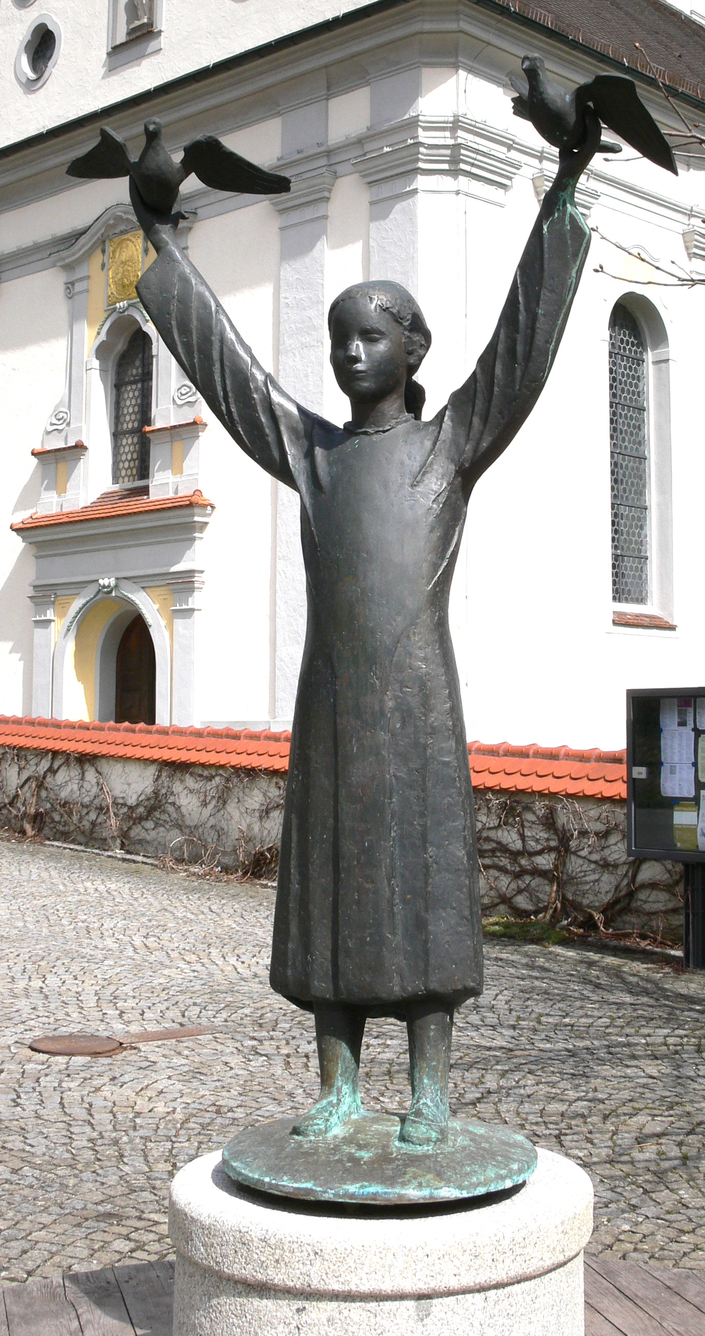 Toni Schneider-Manzell: „Lebensbrunnen“ in Otterswang, Bad Schussenried, Landkreis Biberach, Baden-Württemberg